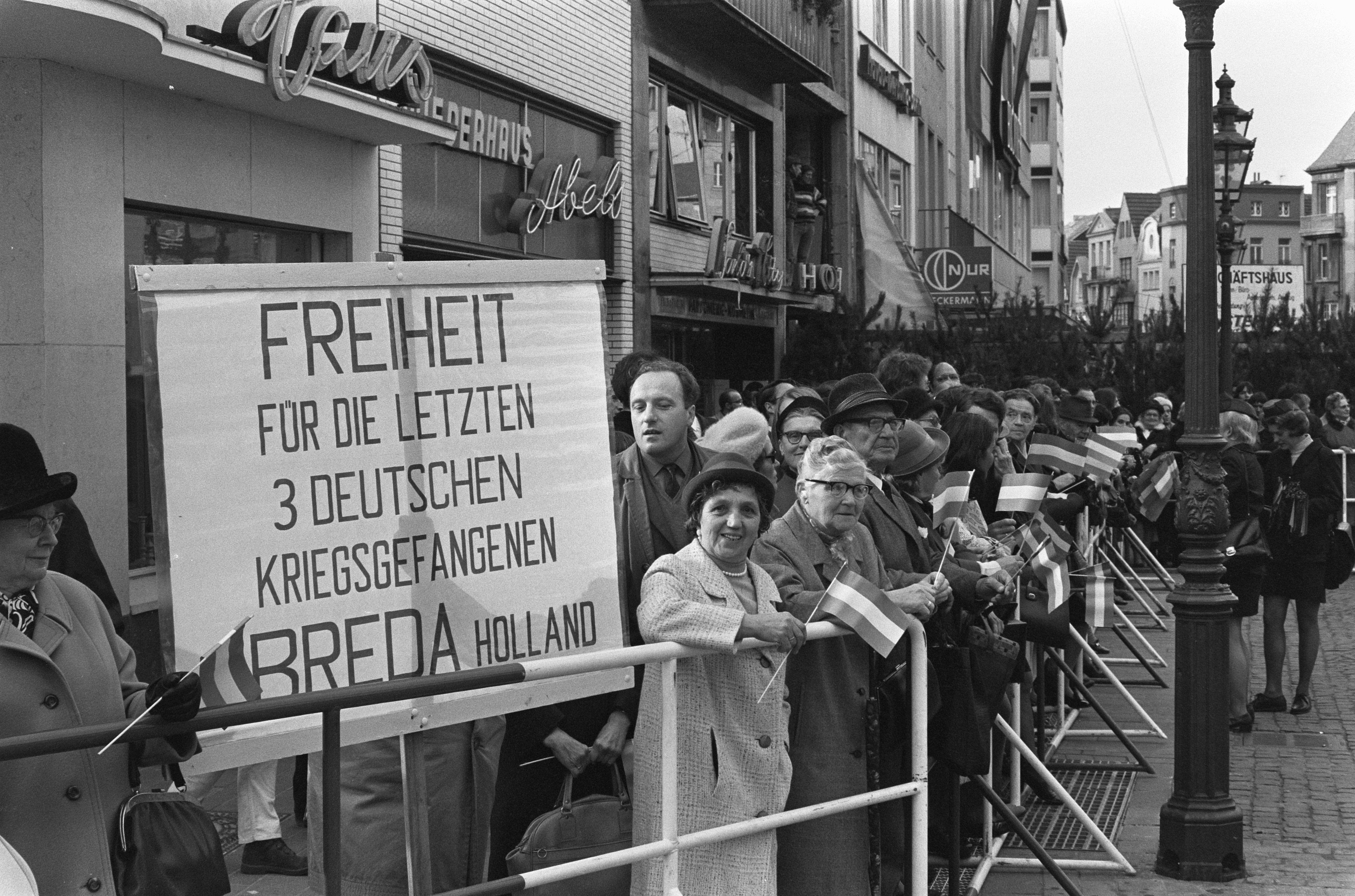 Collectie / Archief : Fotocollectie Anefo Reportage / Serie : Staatsbezoek koningin Juliana en prins Bernhard aan West Duitsland Beschrijving : Demomstranten voor de vrijlating van de laatste drie Duitse oorlogsmisdadigers langs de route van koningin Juliana en prins Bernhard naar de kranslegging bij een monument in de Hofgarten in Bonn Datum : 26 oktober 1971 Locatie : Bonn, West-Duitsland Trefwoorden : staatsbezoeken Fotograaf : Evers, Joost / Anefo, [onbekend] Auteursrechthebbende : Nationaal Archief Materiaalsoort : Negatief (zwart/wit) Nummer archiefinventaris : bekijk toegang 2.24.01.05 Bestanddeelnummer : 925-0780